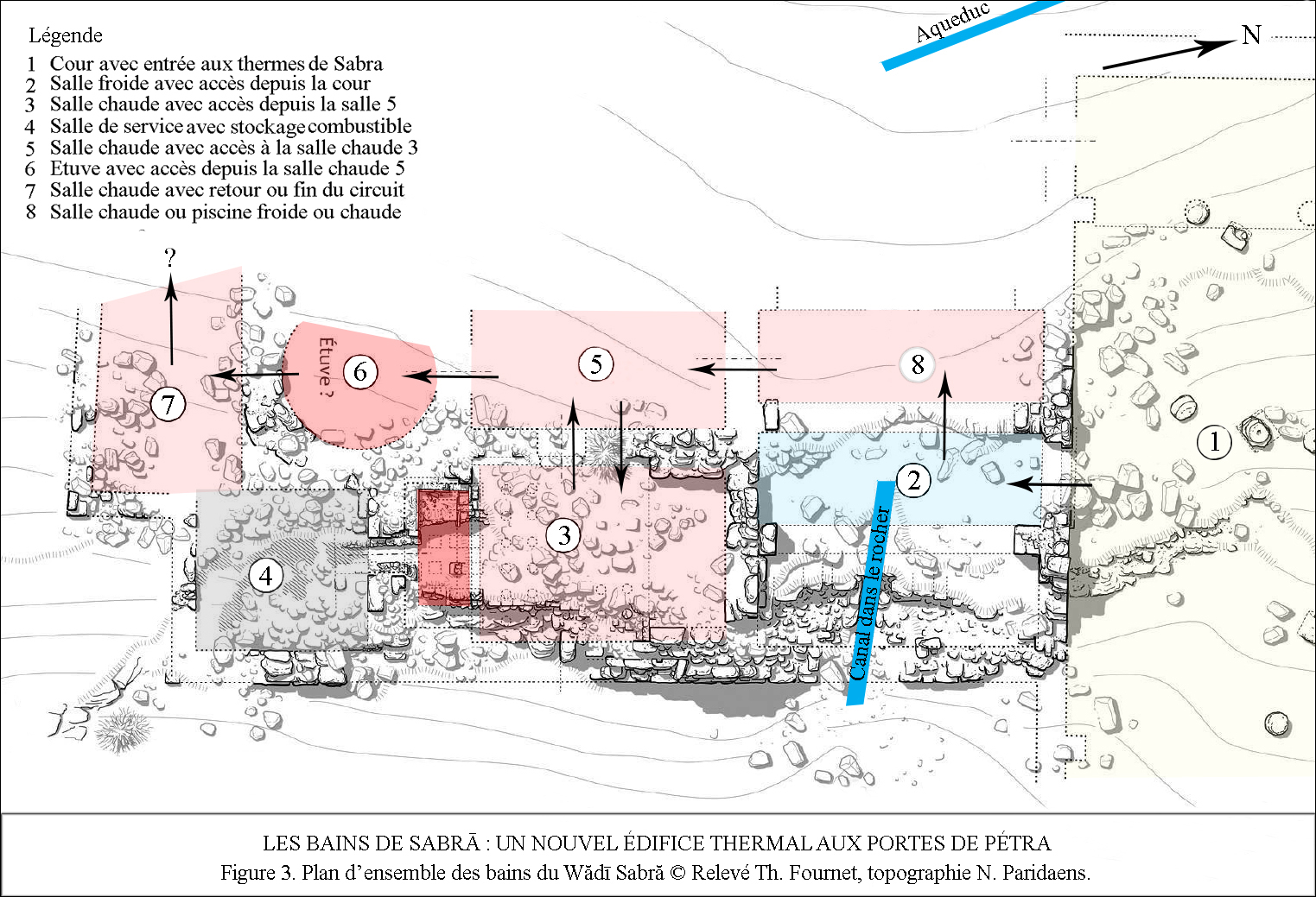 Étude du plan des thermes de Sabra par Thibaud Fournet